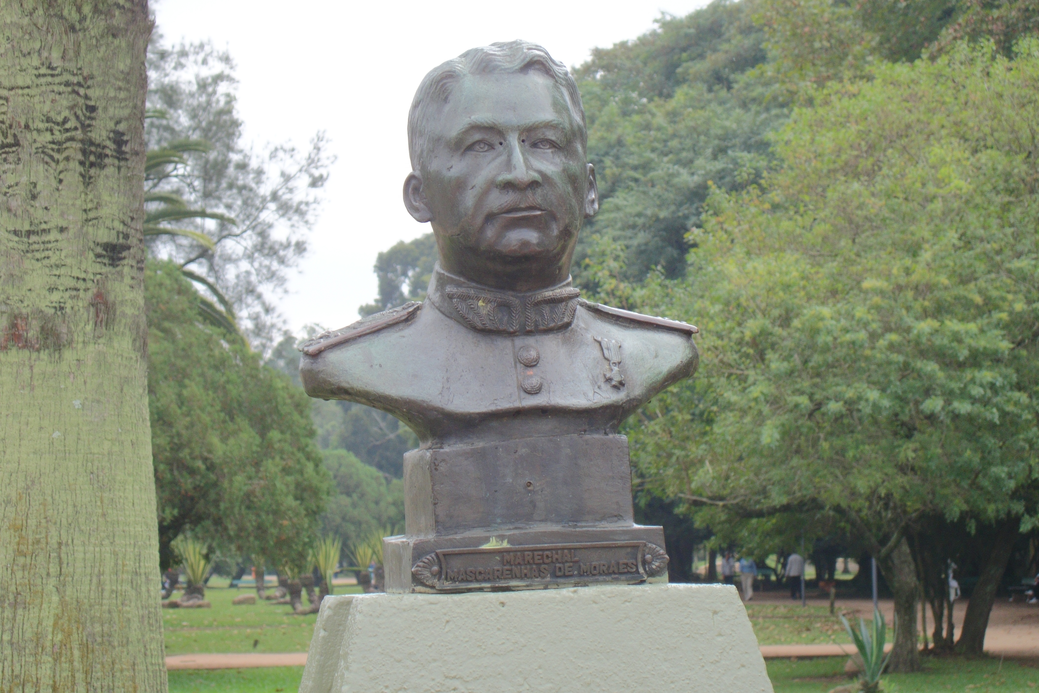 Busto de Mascarenhas de Morais no Parque da Redenção em Porto Alegre, Rio Grande do Sul, Brasil